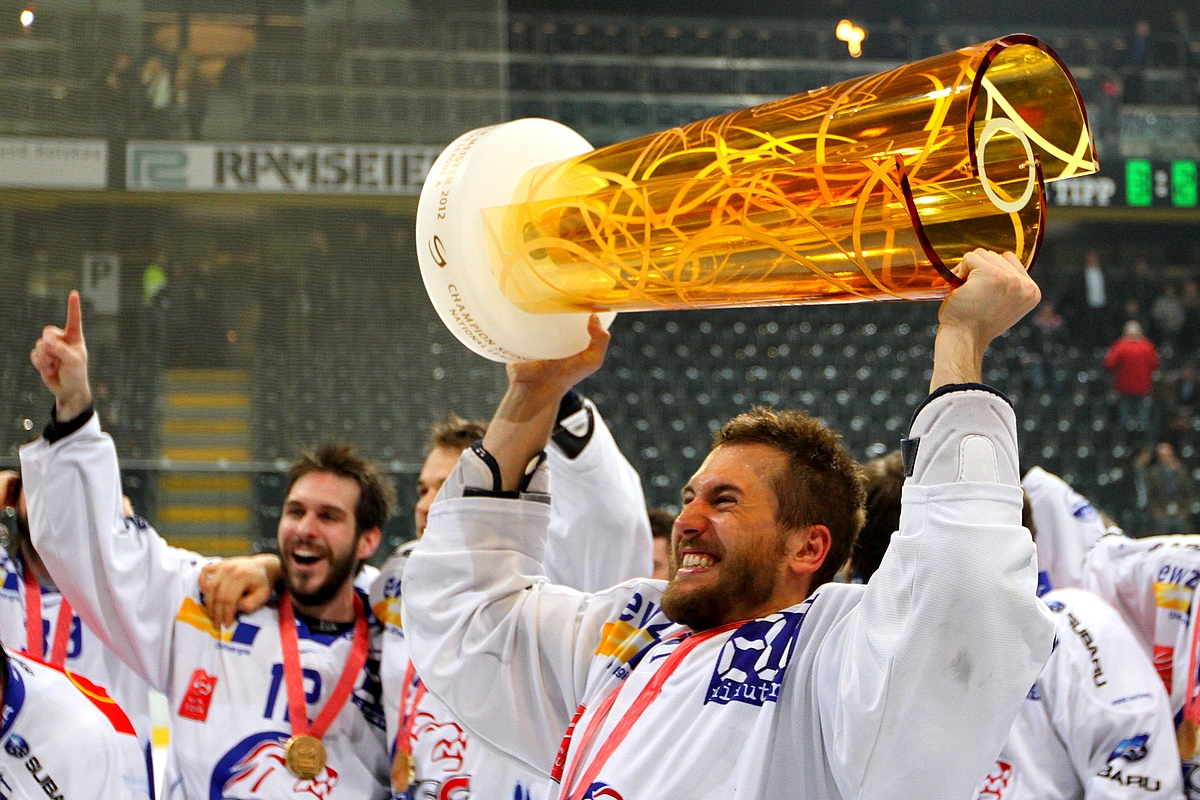 Jeff Tambellini avec la coupe de champion de Suisse en 2012.